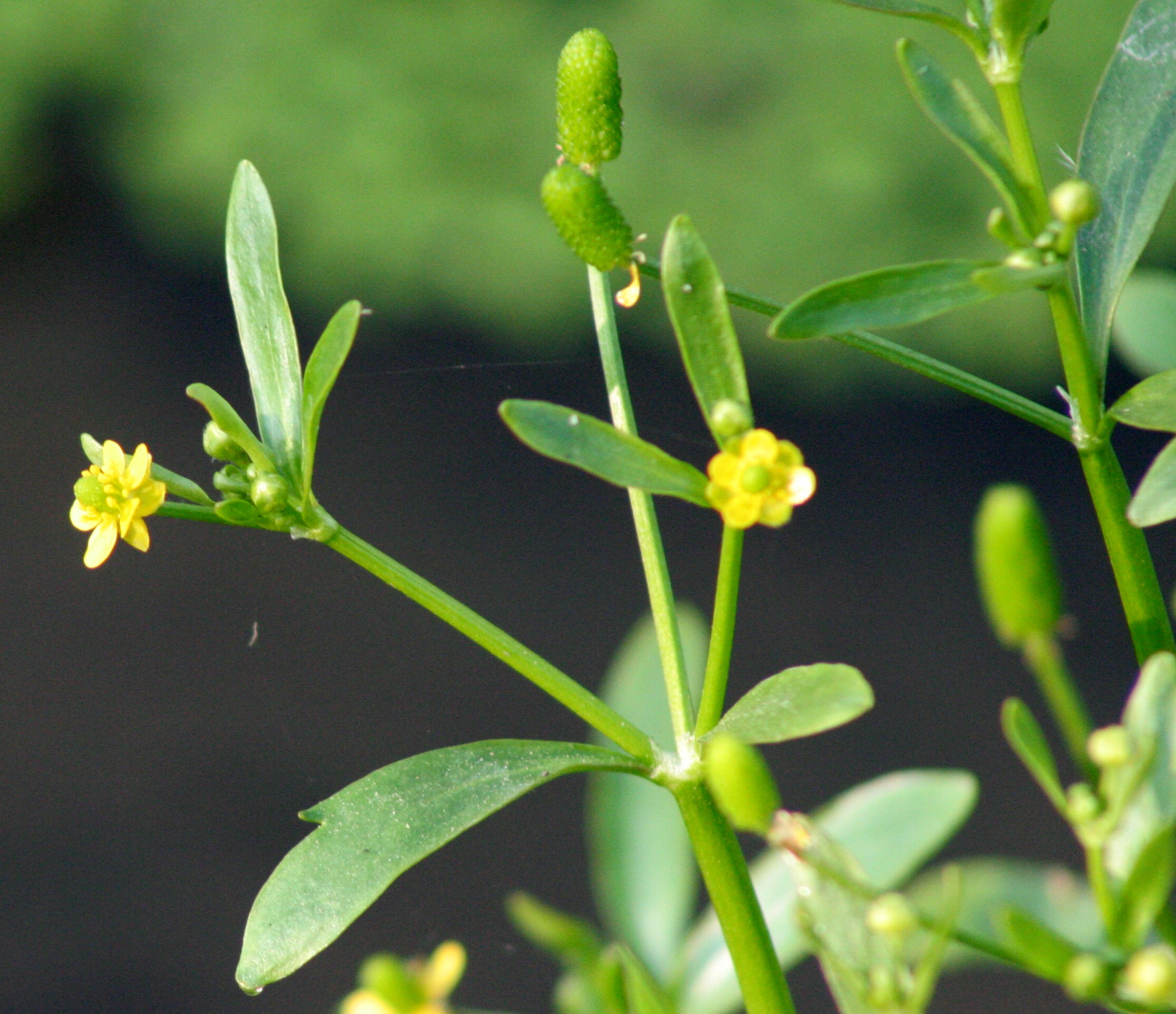 Ranuncolo di palude - Località: Canizzano (TV), 10 m s.l.m.